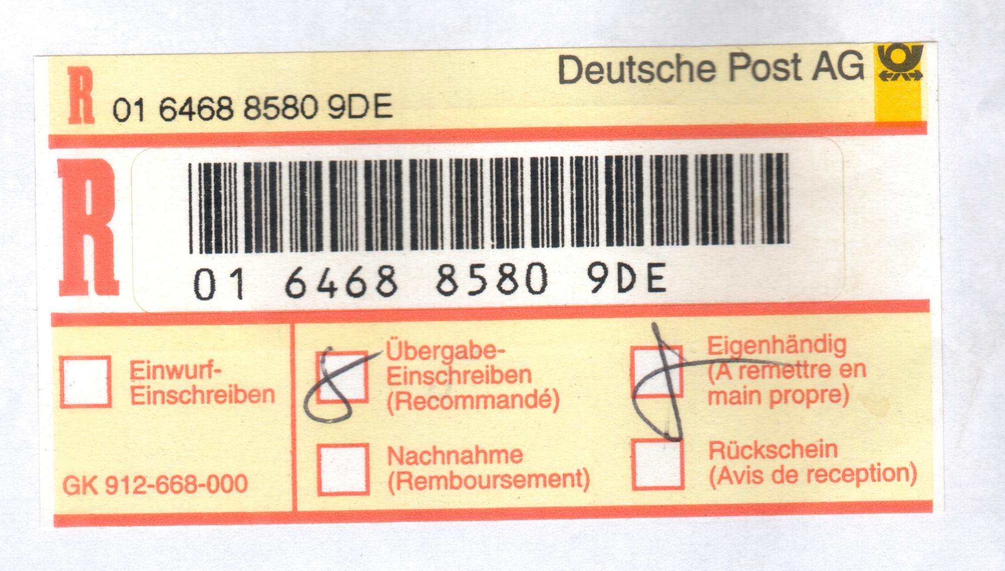 Rekozettel der Deutschen Post AG